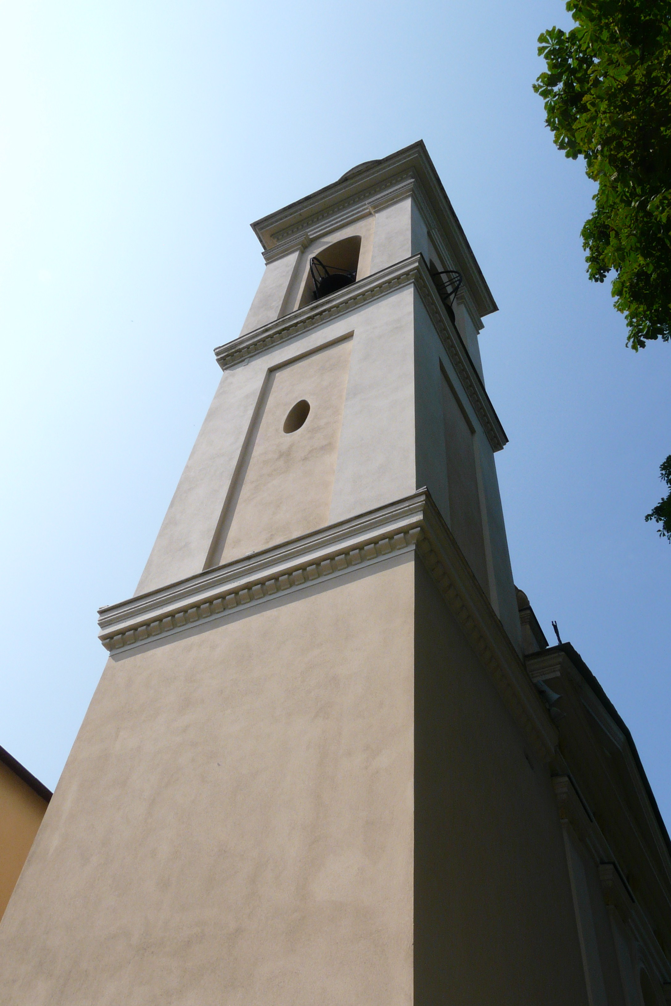 Chiesa di Santa Maria e San Michele Arcangelo, Nascio, Ne, Liguria, Italia